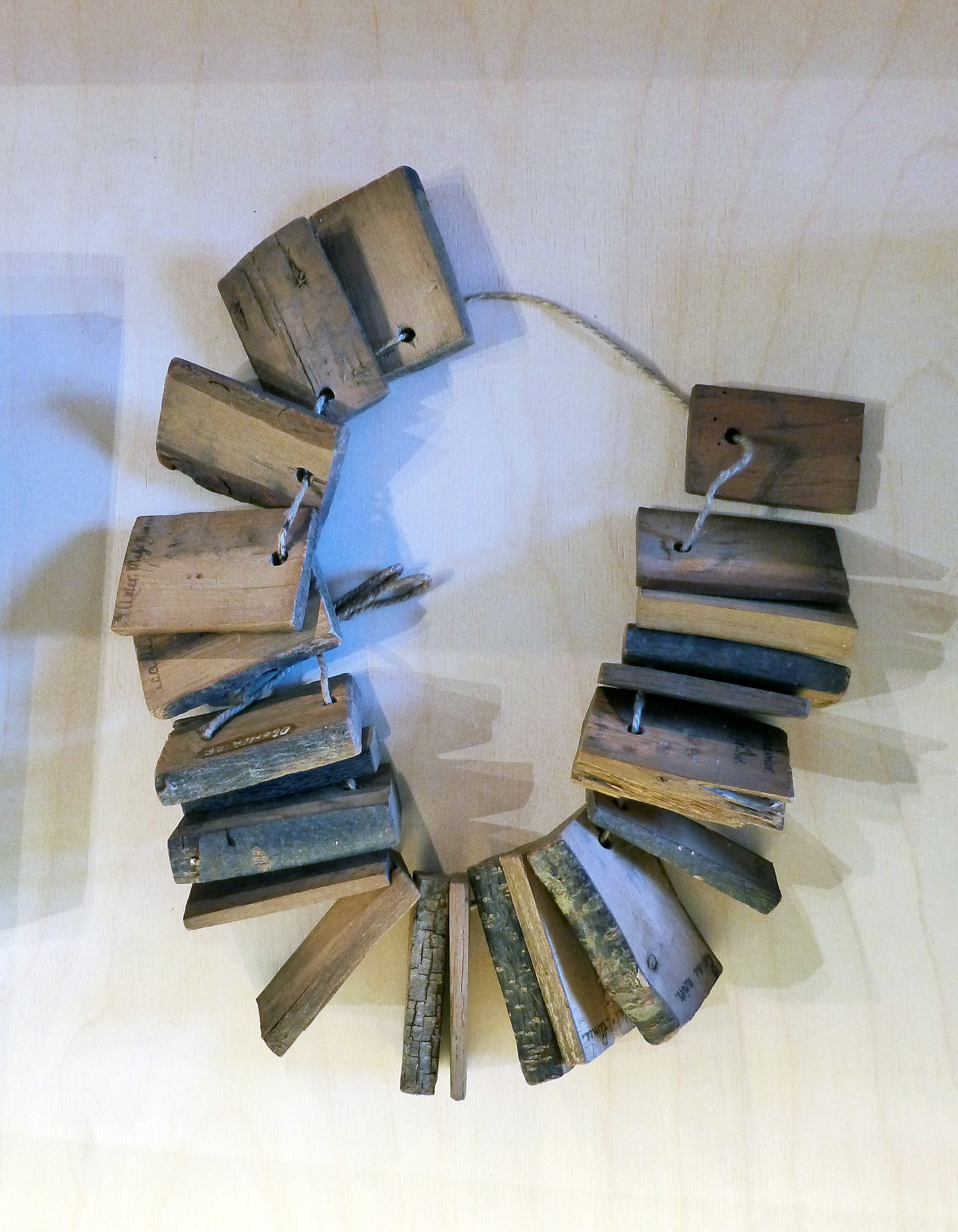 Echantillons de bois régionaux du XVIIIe siècle, réunis par le pasteur Jean-Frédéric Oberlin. Les noms français et allemands sont mentionnés pour chaque plaquette. Musée Jean-Frédéric Oberlin à Waldersbach (Bas-Rhin, Alsace). Dépôt du Musée alsacien de Strasbourg.